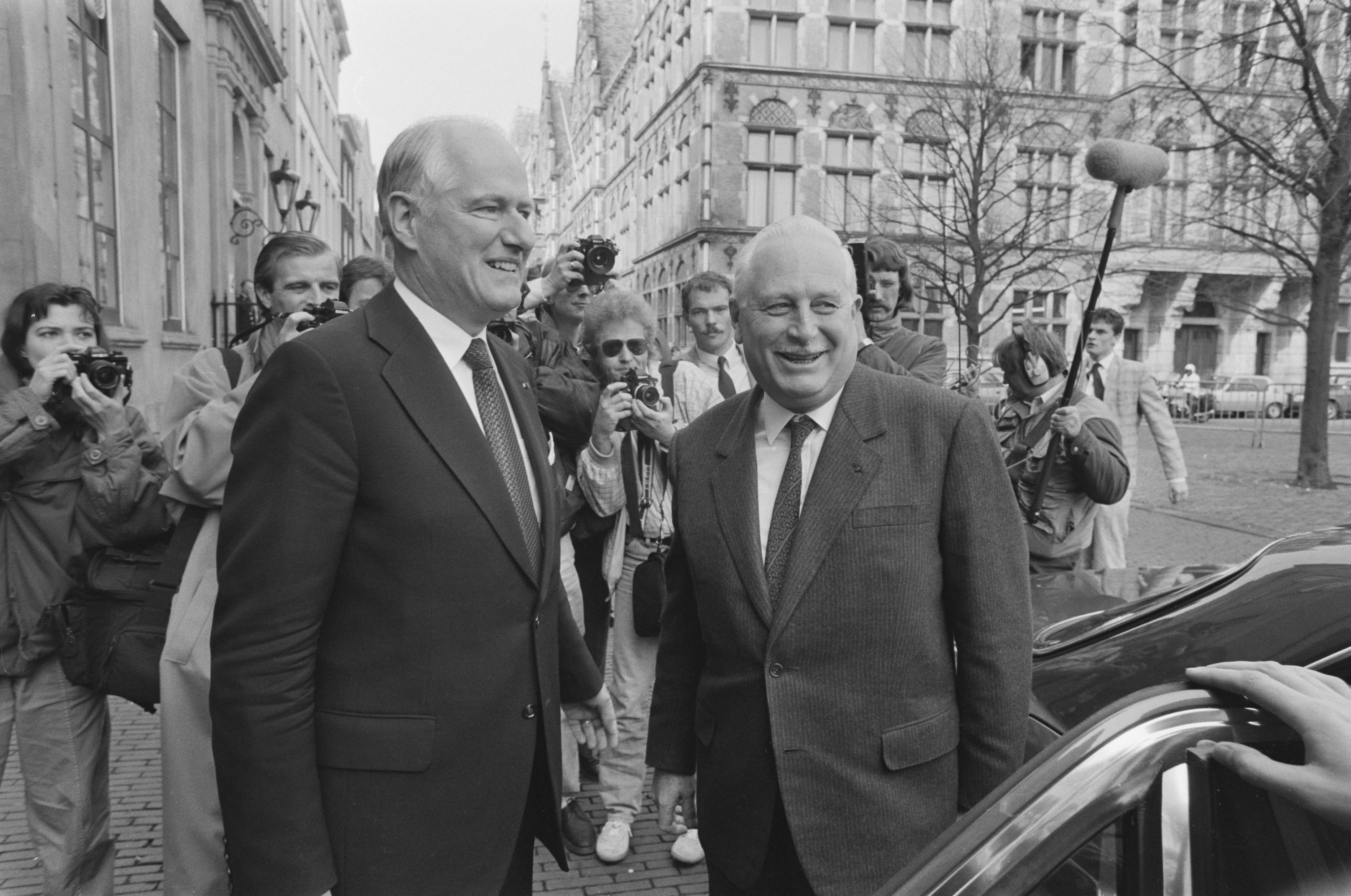 Collectie / Archief : Fotocollectie Anefo Reportage / Serie : [ onbekend ] Beschrijving : Minister Van Eekelen (m) en Franse minister Girand inspecteren erewacht op het Plein in Den Haag Datum : 13 april 1987 Locatie : Den Haag, Zuid-Holland Trefwoorden : erewachten, ministers Persoonsnaam : Eekelen, Wim van Fotograaf : Bogaerts, Rob / Anefo Auteursrechthebbende : Nationaal Archief Materiaalsoort : Negatief (zwart/wit) Nummer archiefinventaris : bekijk toegang 2.24.01.05 Bestanddeelnummer : 933-9519